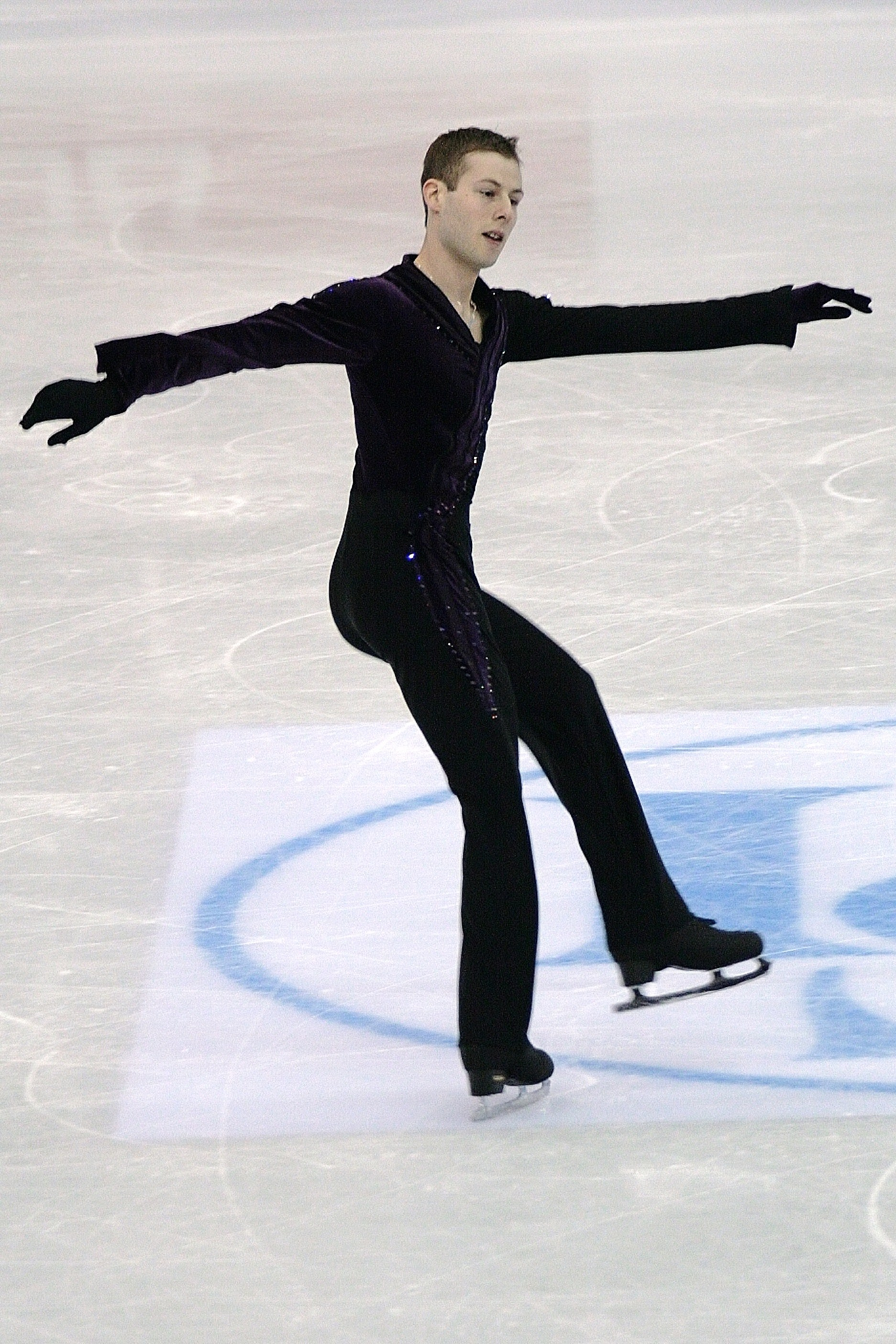 Мацей Цеплюха (Польша) на чемпионате мира по фигурному катанию 2012.